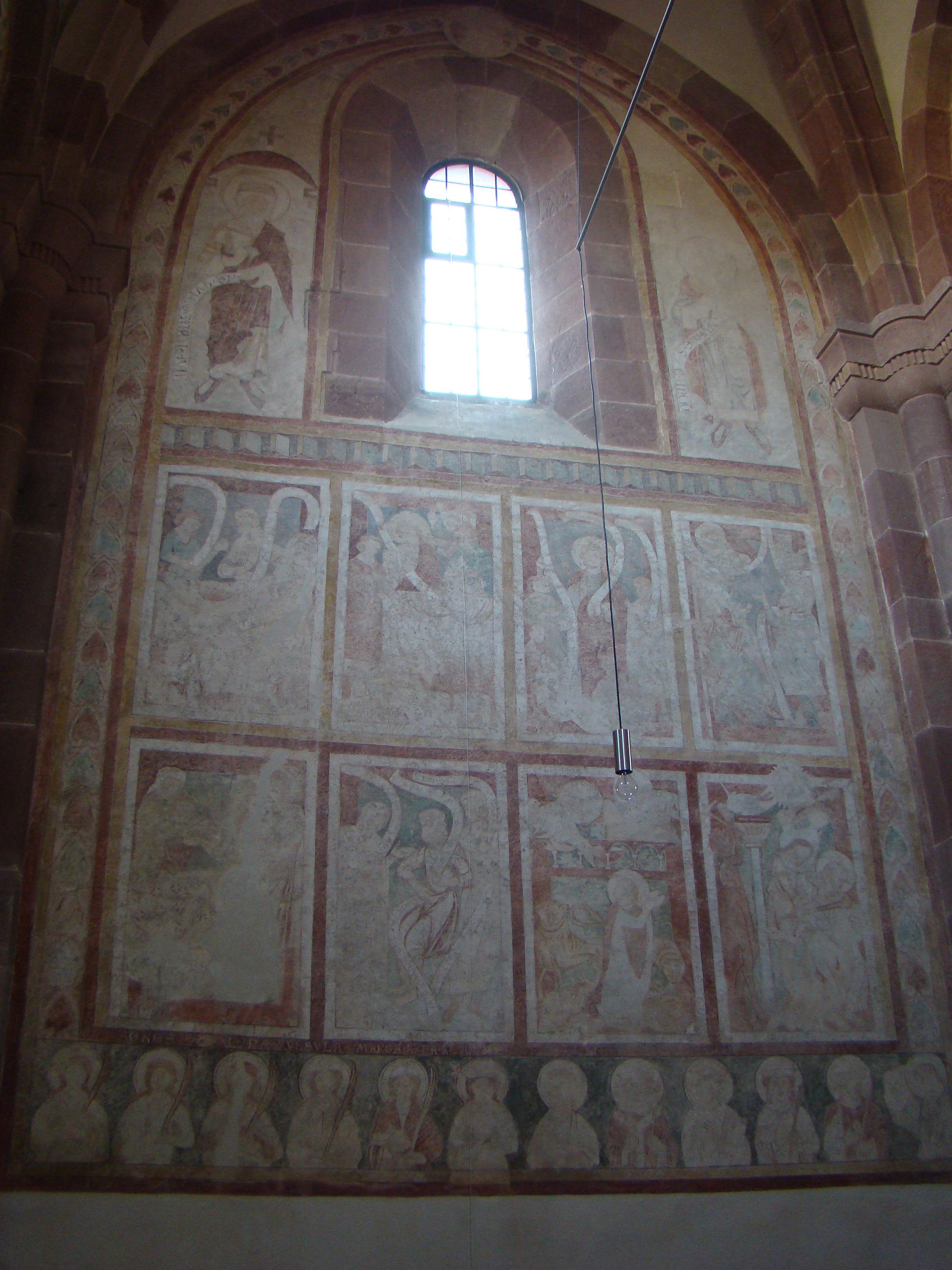 Klosterkirche Lobenfeld